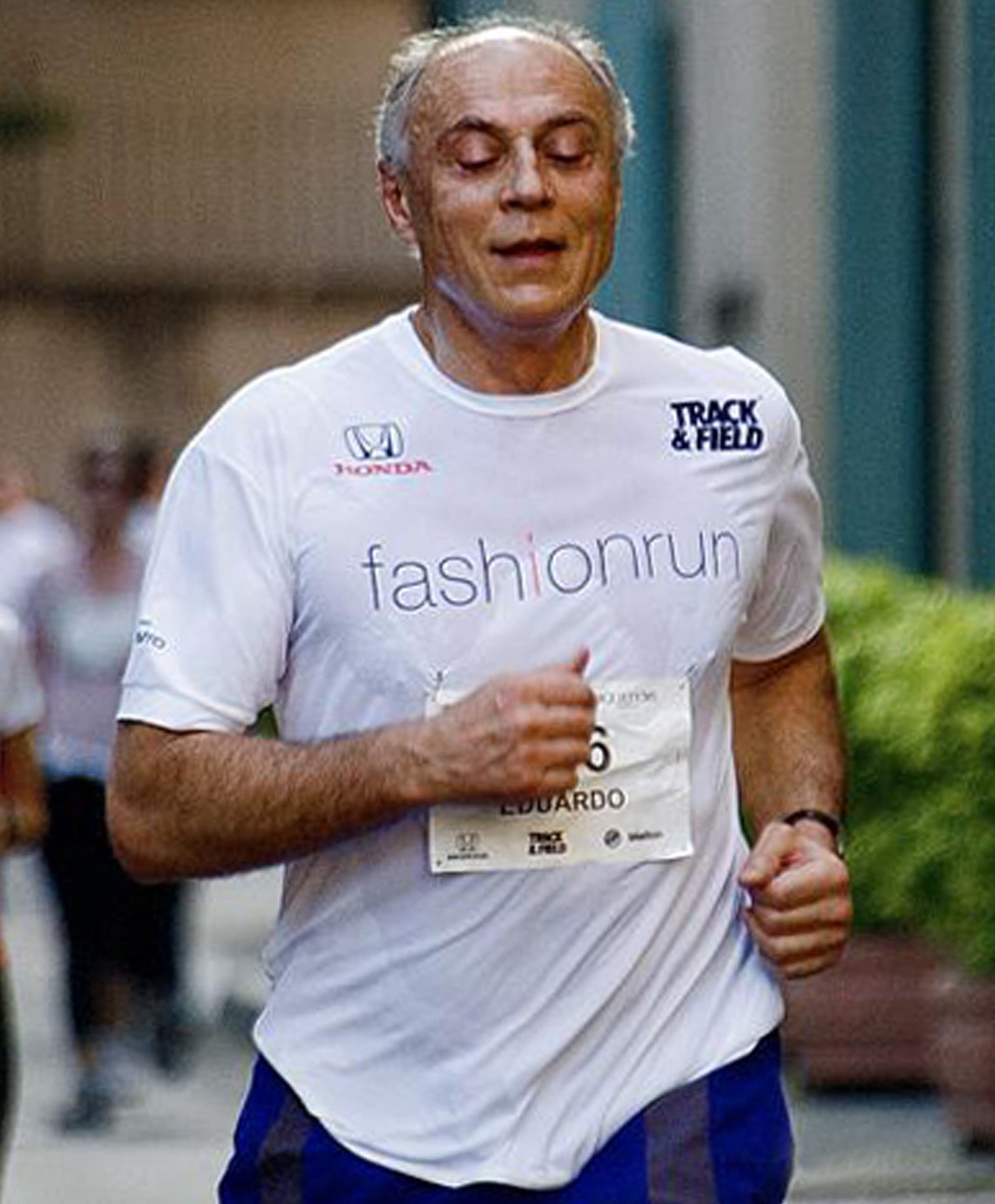 O senador paulista Eduardo Suplicy durante uma minimaratona.